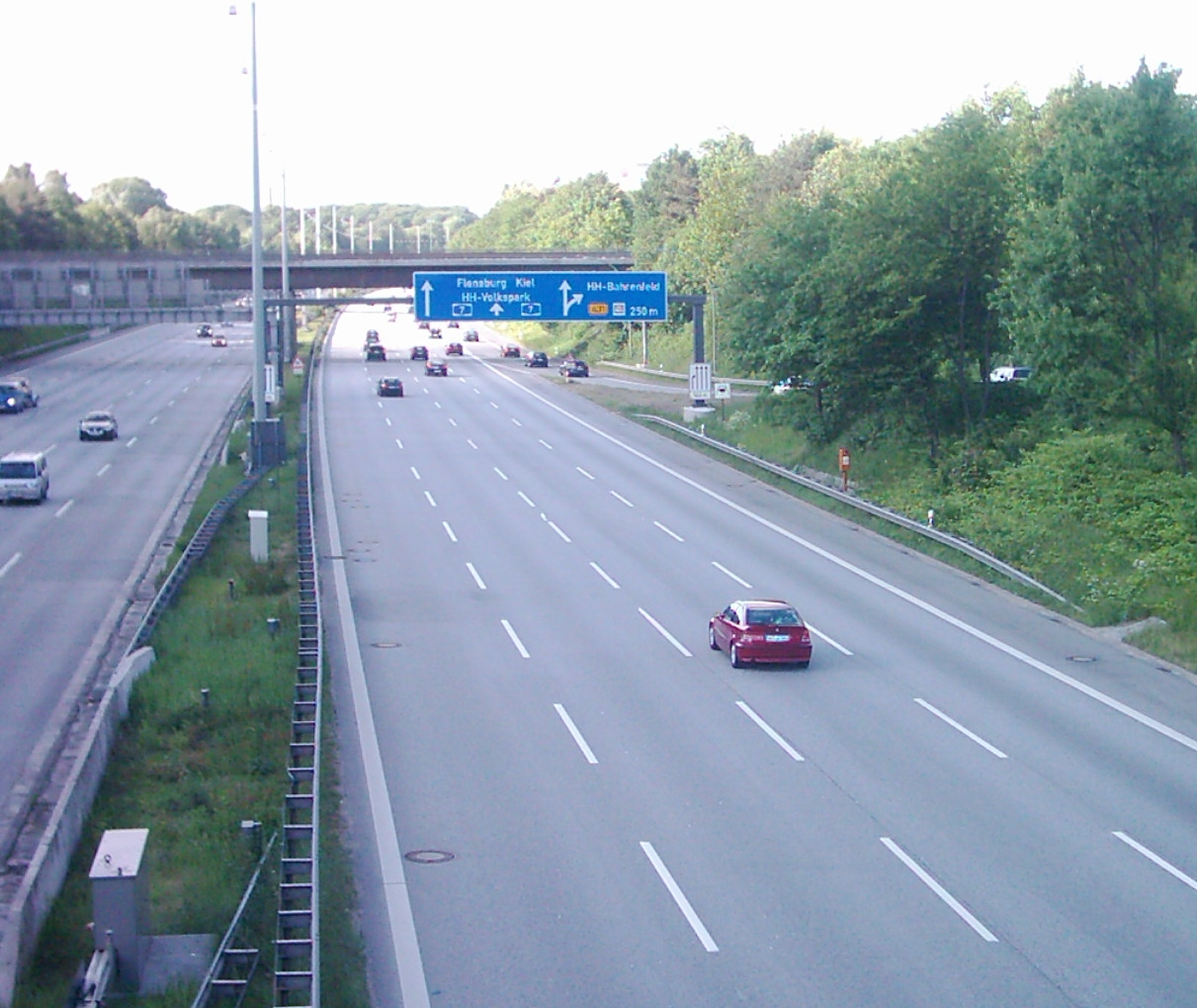 Die A 7 in Hamburg. Blick von der AS Othmarschen, Behringstraße, Richtung Norden.